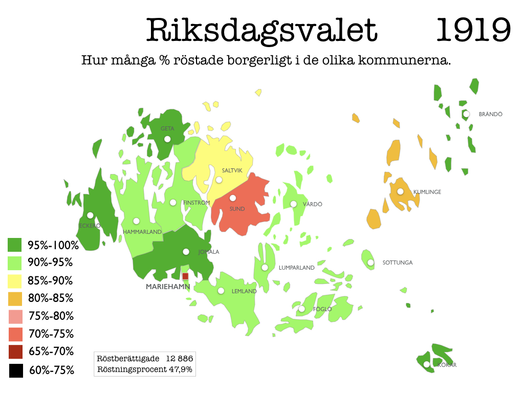 Kartan visar hur borgerligt ålänningarna röstade i riksdagsvalet 1919 och detta per kommun.